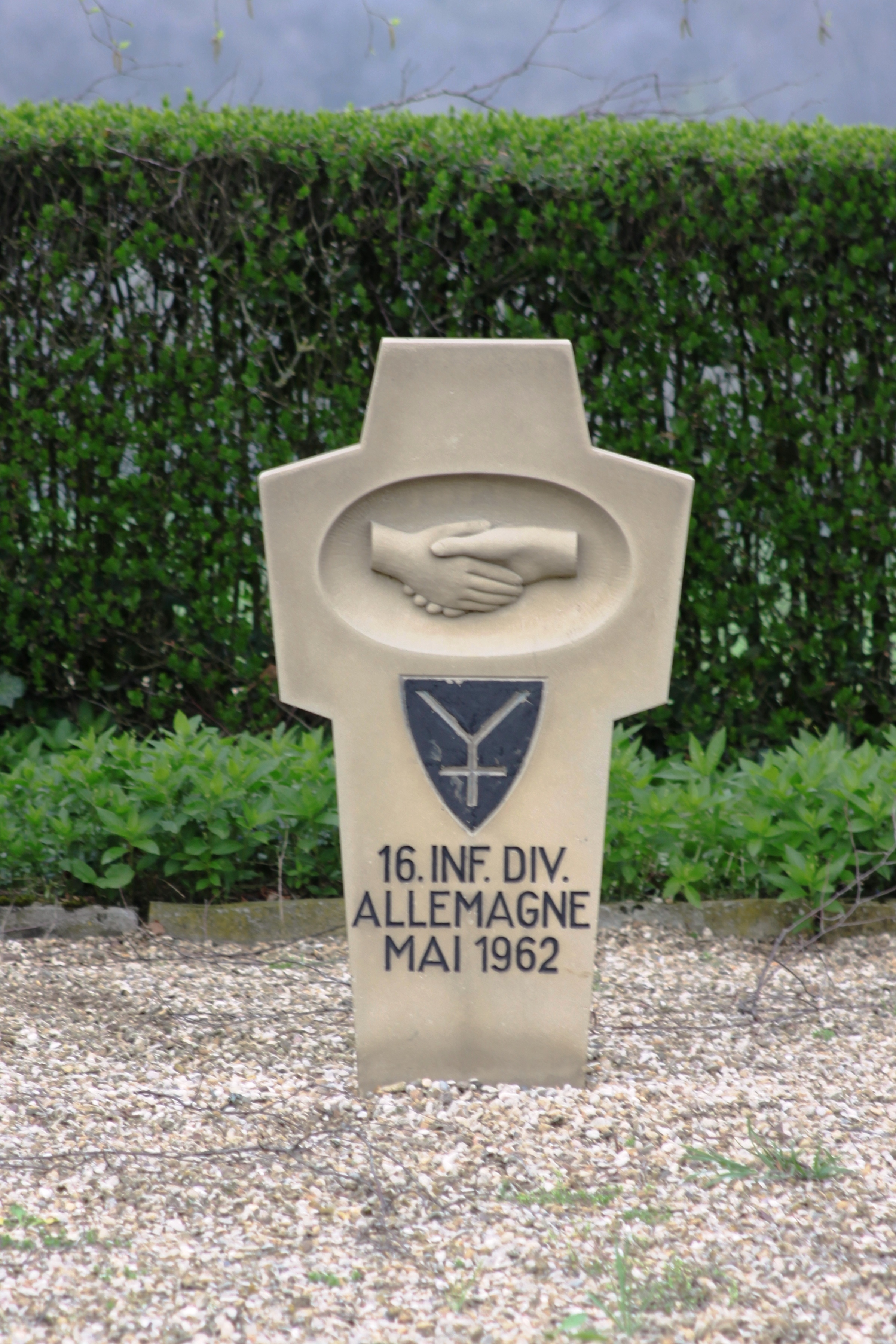 Monument de la réconciliation zu Stonne